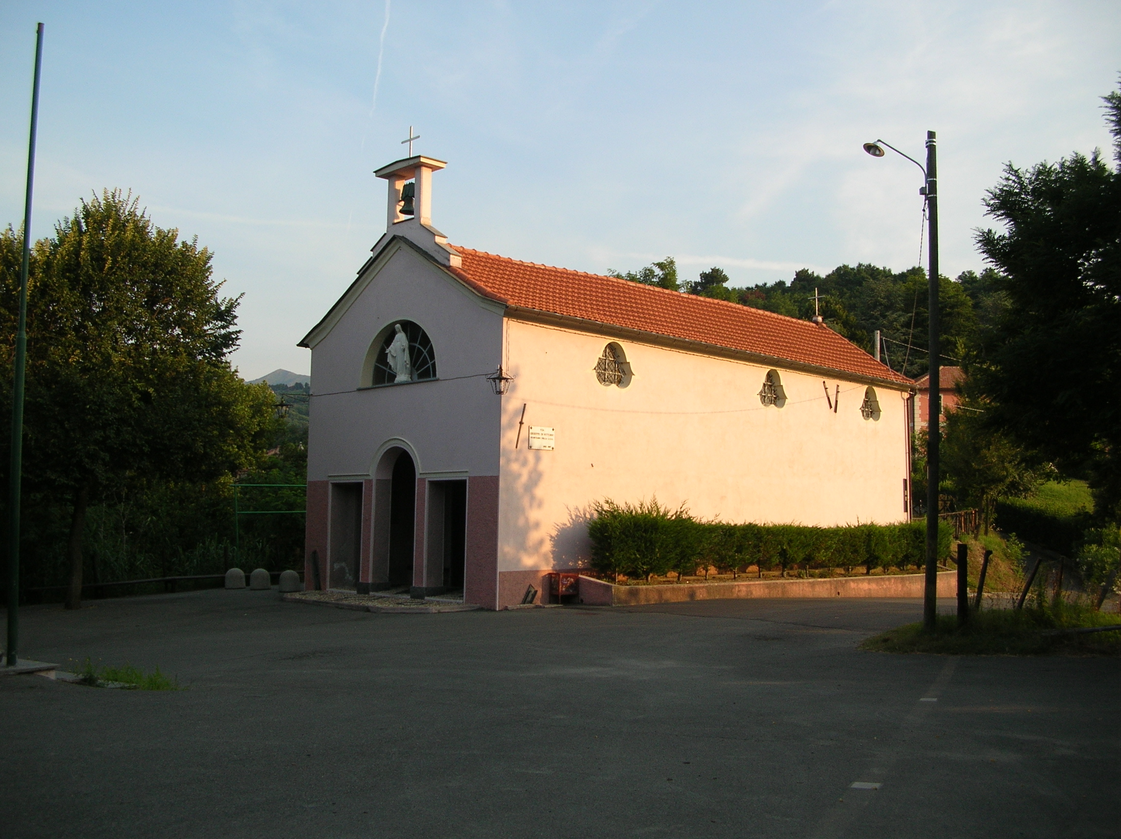 Cappella della Madonna delle Vigne (Mignanego, Genova) Foto propria Giugno 2008 Licensing Categoria:Chiese di Mignanego